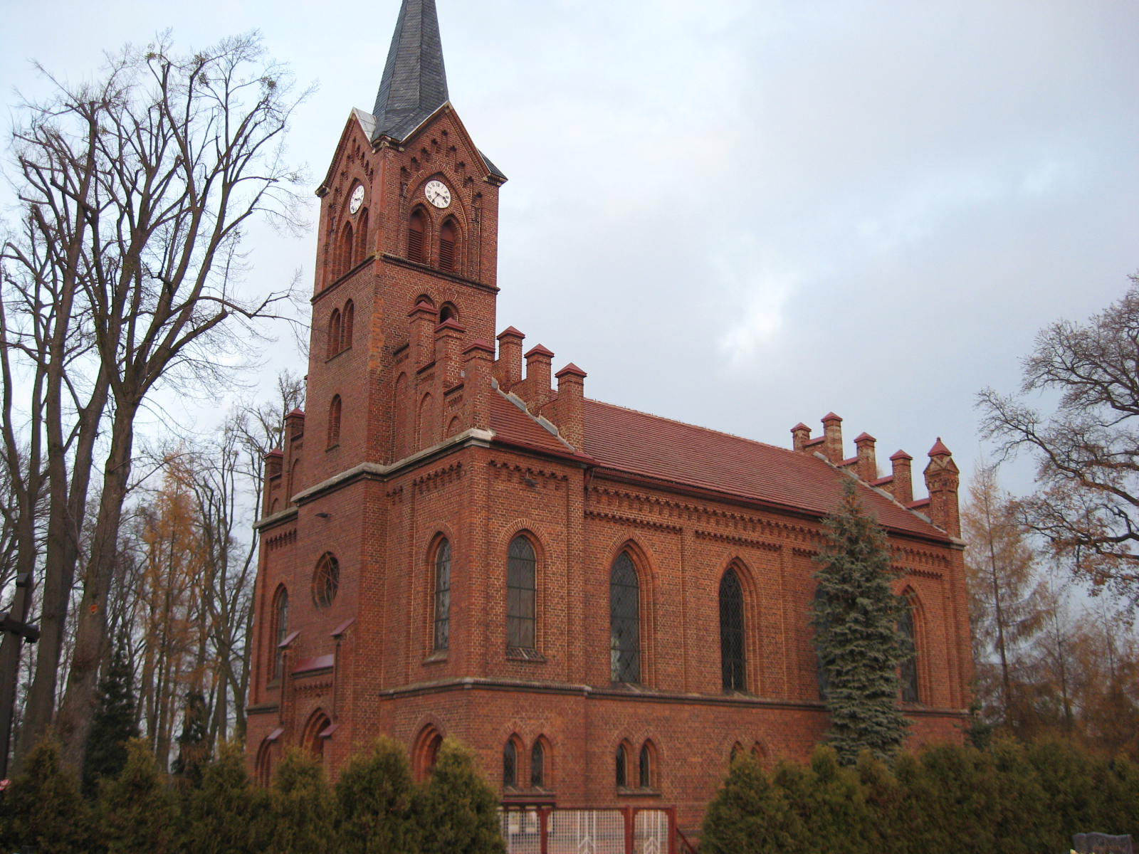 Smardy Górne - neogotycki kościół pw. Podwyższenia Krzyża Świętego